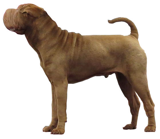 Shar Pei sur fond blanc